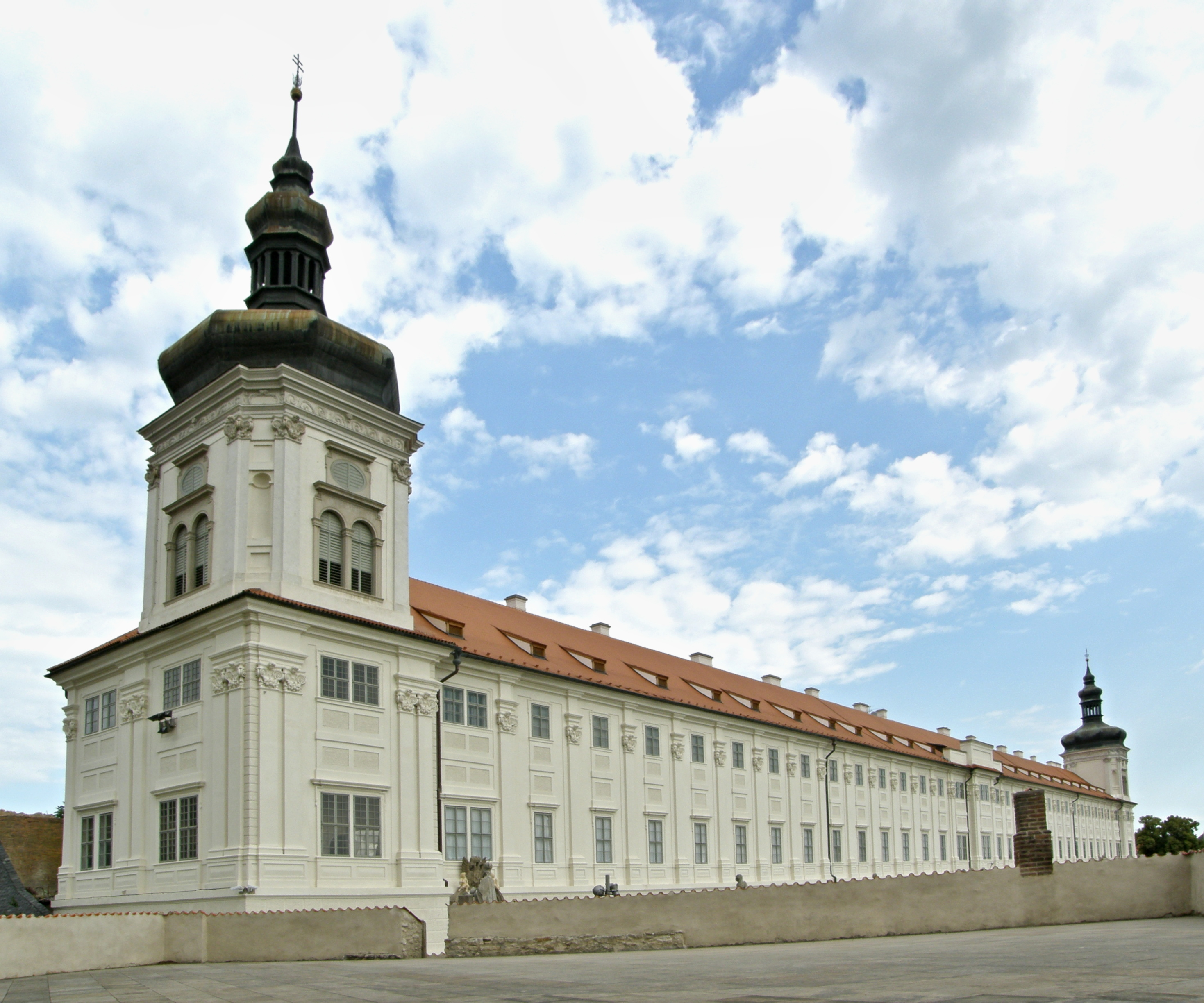 Jezuitská kolej v Kutné Hoře, pohled na budovu od Chrámu sv. Barbory.